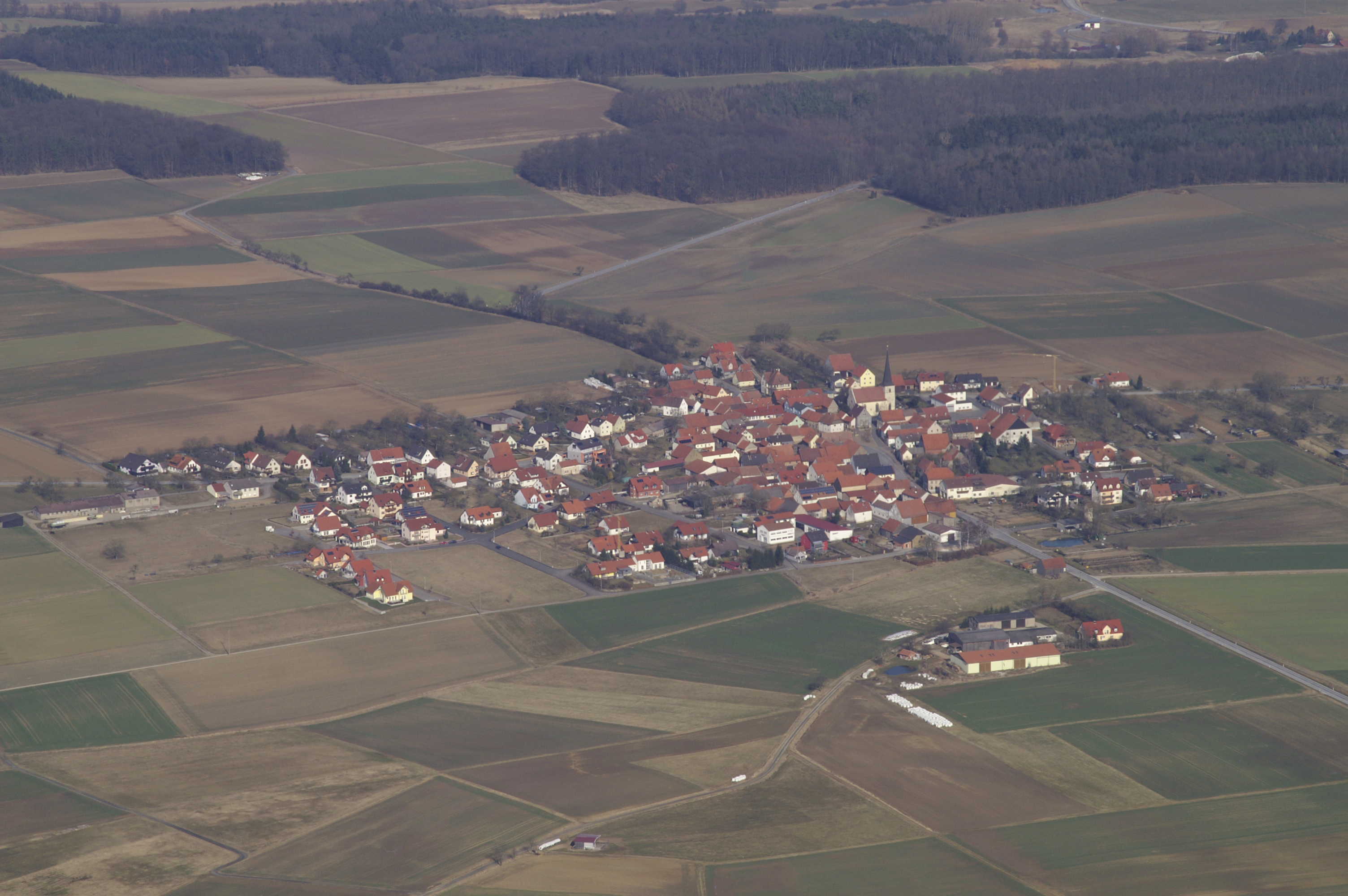 Ballingshausen aus der Luft